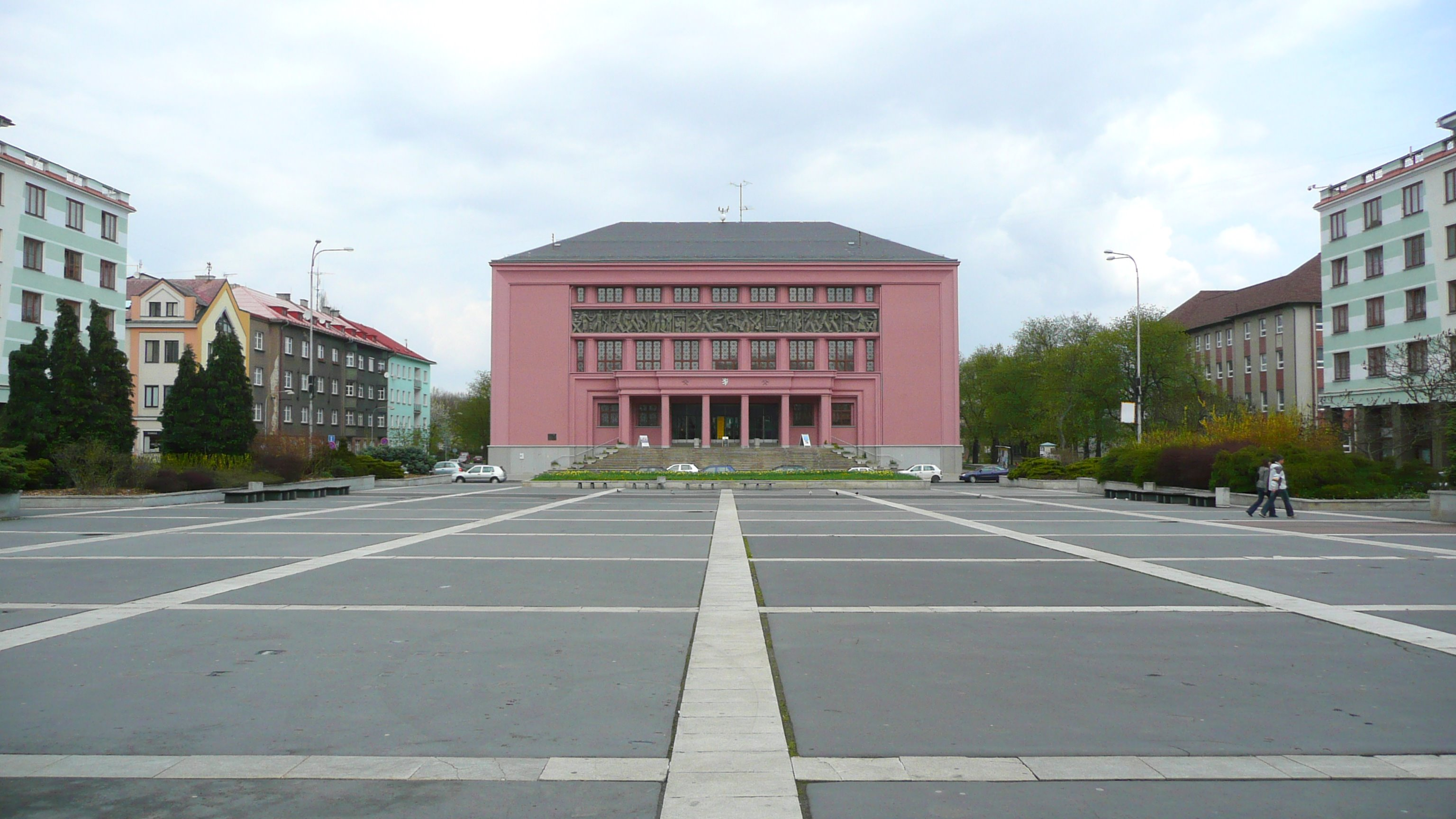 Náměstí Budovatelů a Hornický dům (architekt Rudolf Wels, 1934), Sokolov